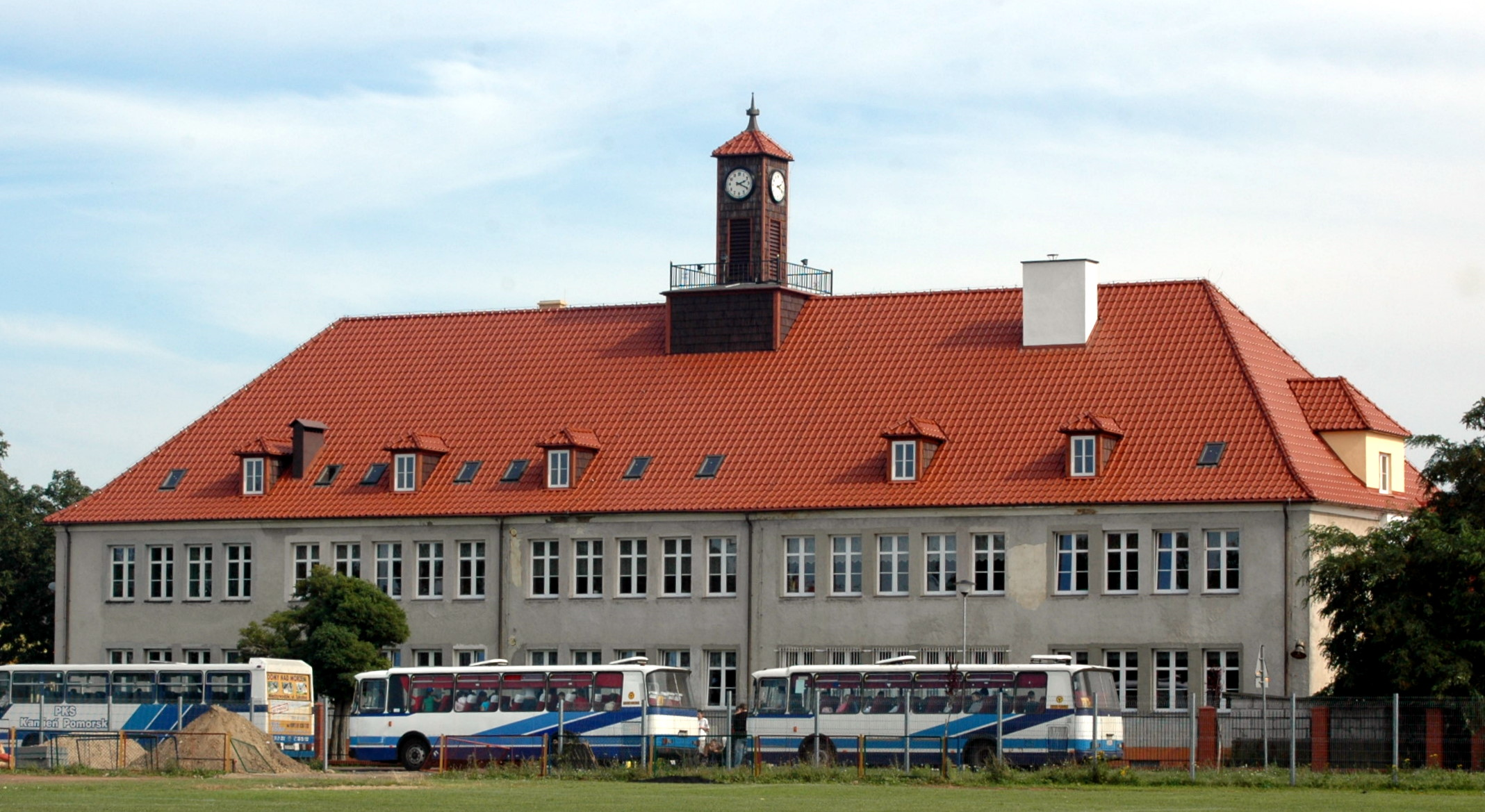 Gimnazjum w Wolinie